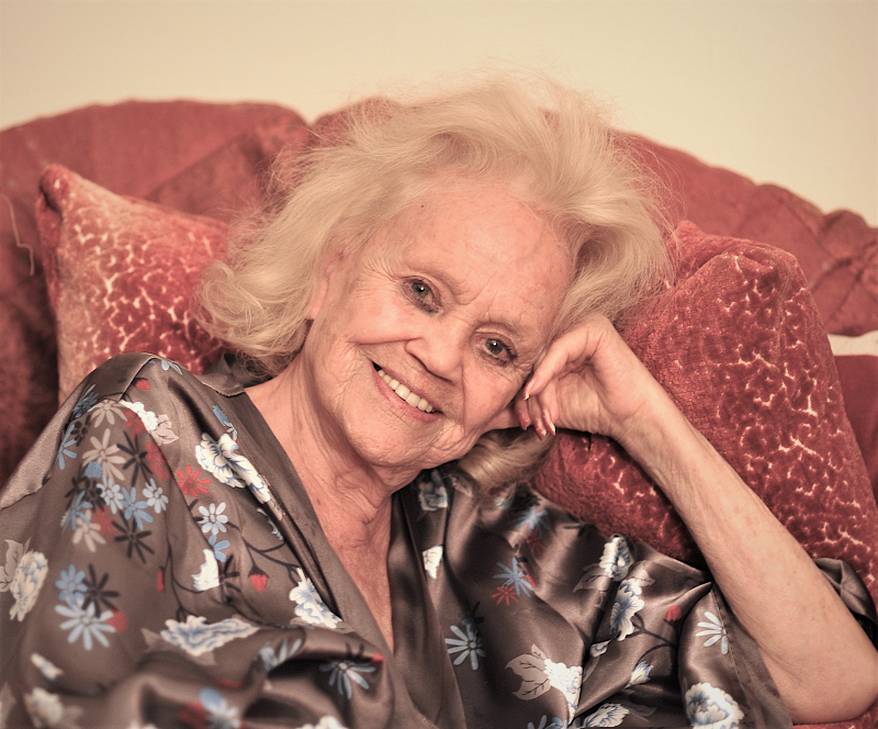 Diane de margerie